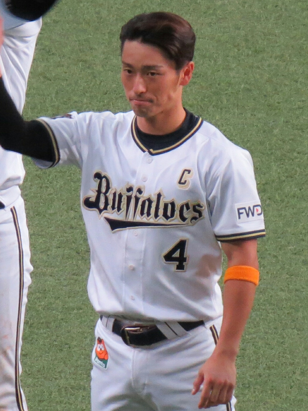 福田周平20190921